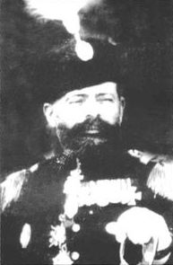 Генерал Светозар Нешич